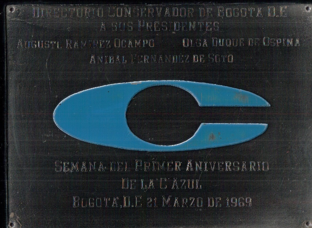 Placa conmemorativa C Azul